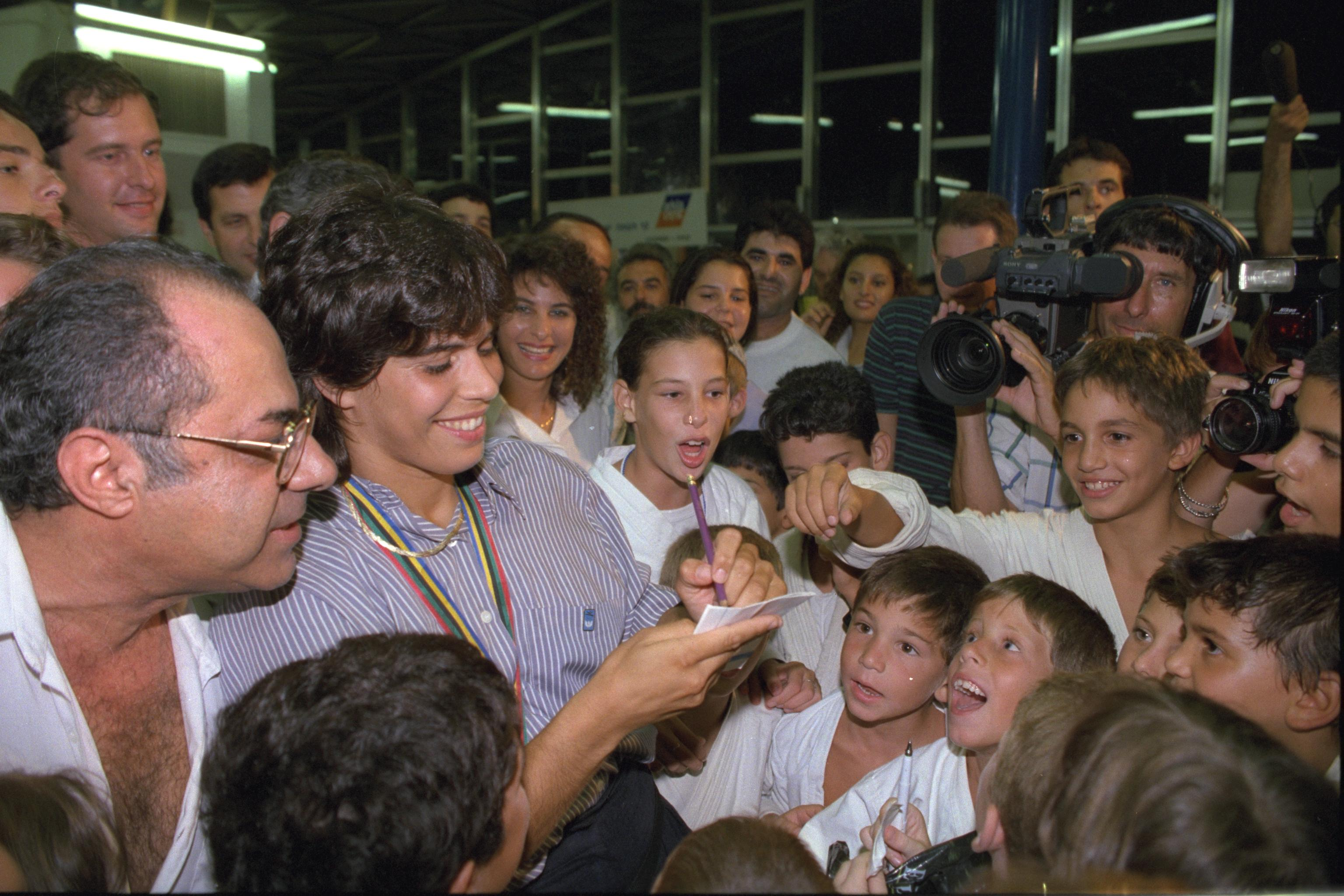 Barcelona Olympic Medalist Yael Arad gives out her autograph to fans. זוכת המדליה האולימפית יעל ארד חותמת למעריצים. Photo: KOREN ZIV, 10/08/1992.